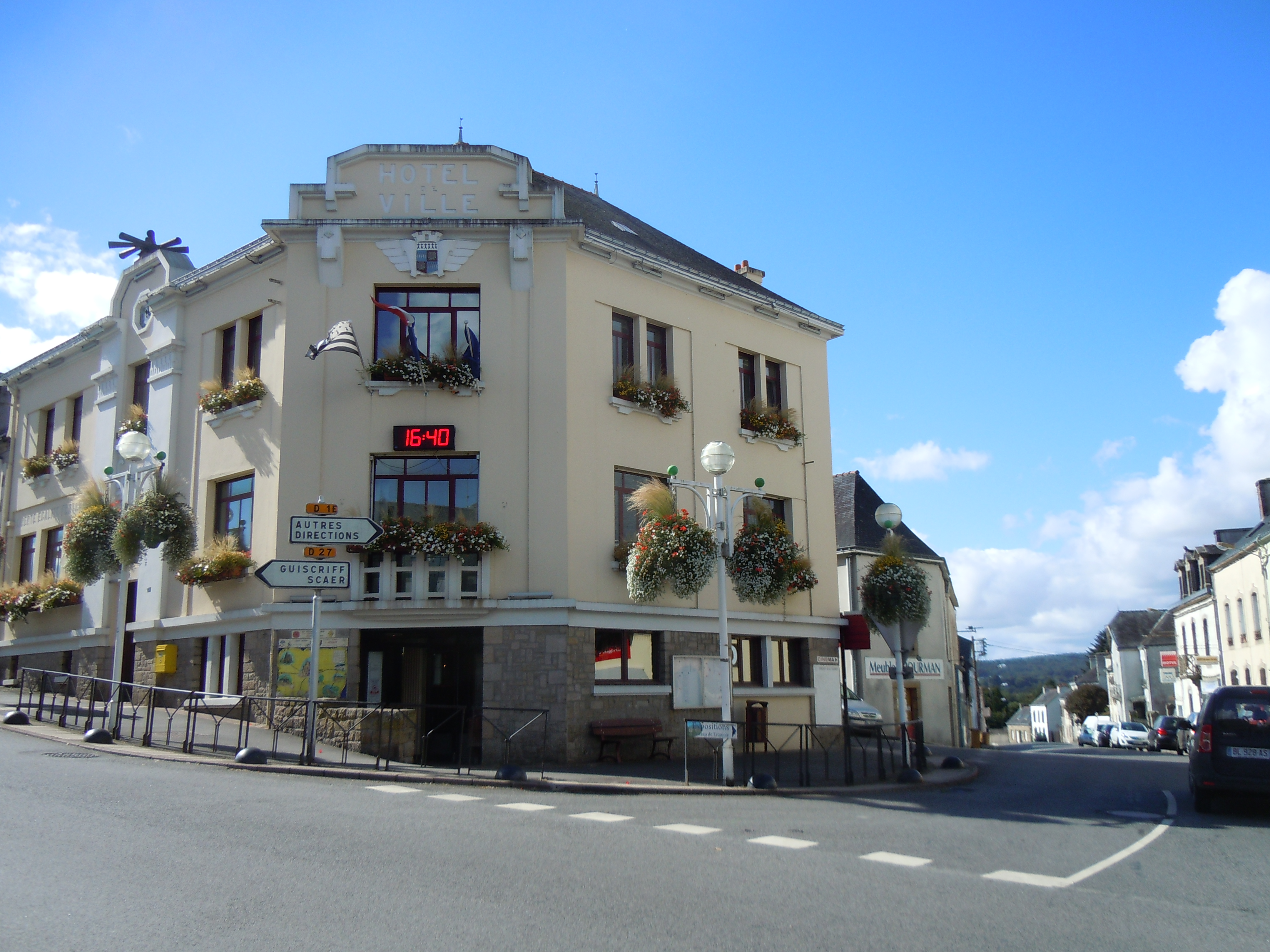 la mairie de la ville de Gourin située dans le département du Morbihan